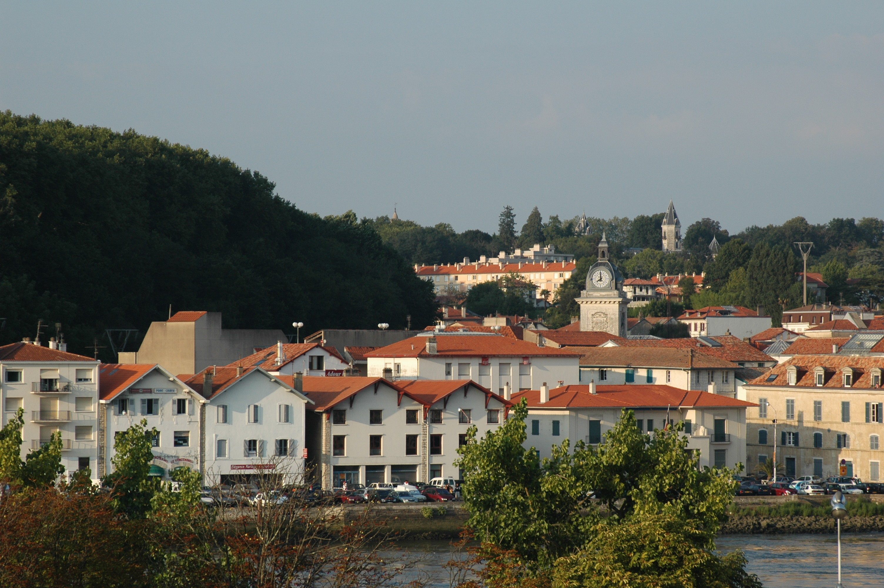 Bayonne, quartier Saint-Esprit. Photo prise le 06/08/06 par Harrieta171